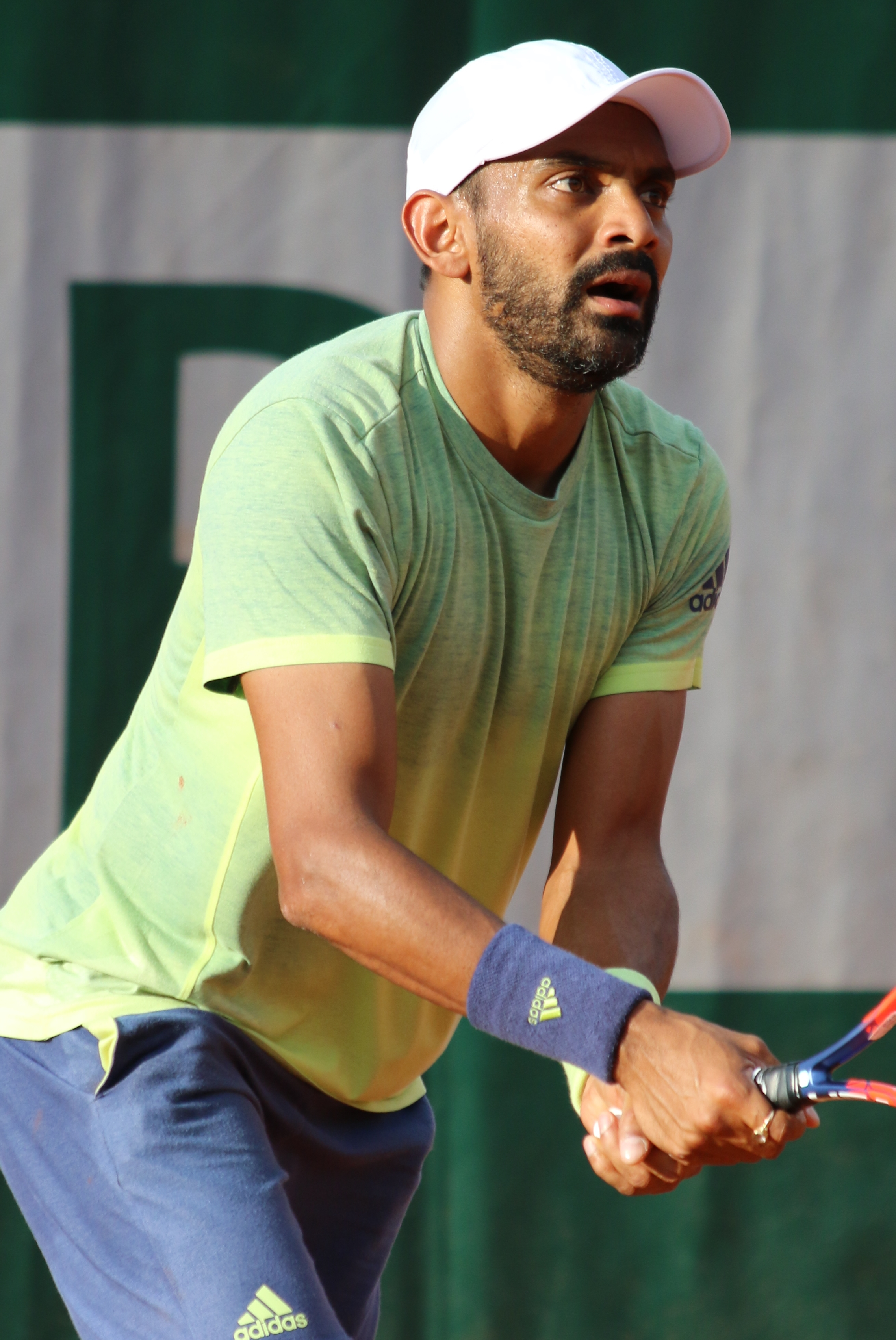 Sharan RG18 (3)